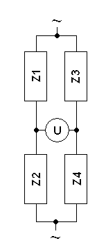 Maxwellbrücke Prinzipskizze